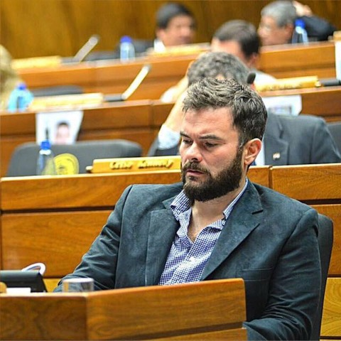 Representante del Paraguay en el Parlasur. Ex Diputado Nacional (PLRA) por Asunción. Vice Ministro del MOPC.